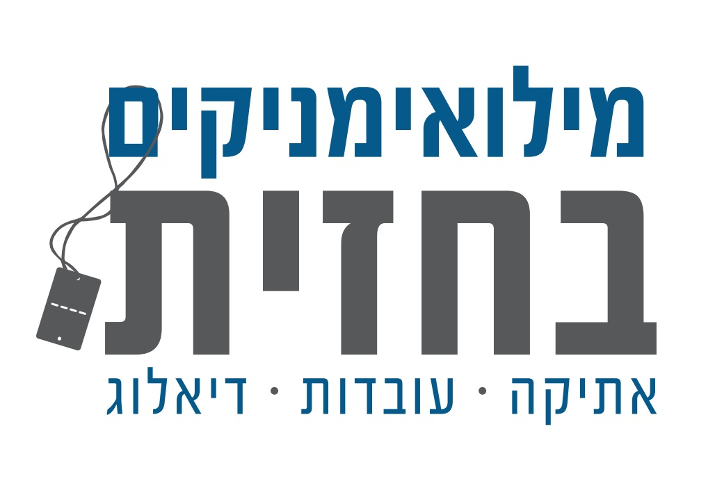 סמליל מילואימניקים בחזית